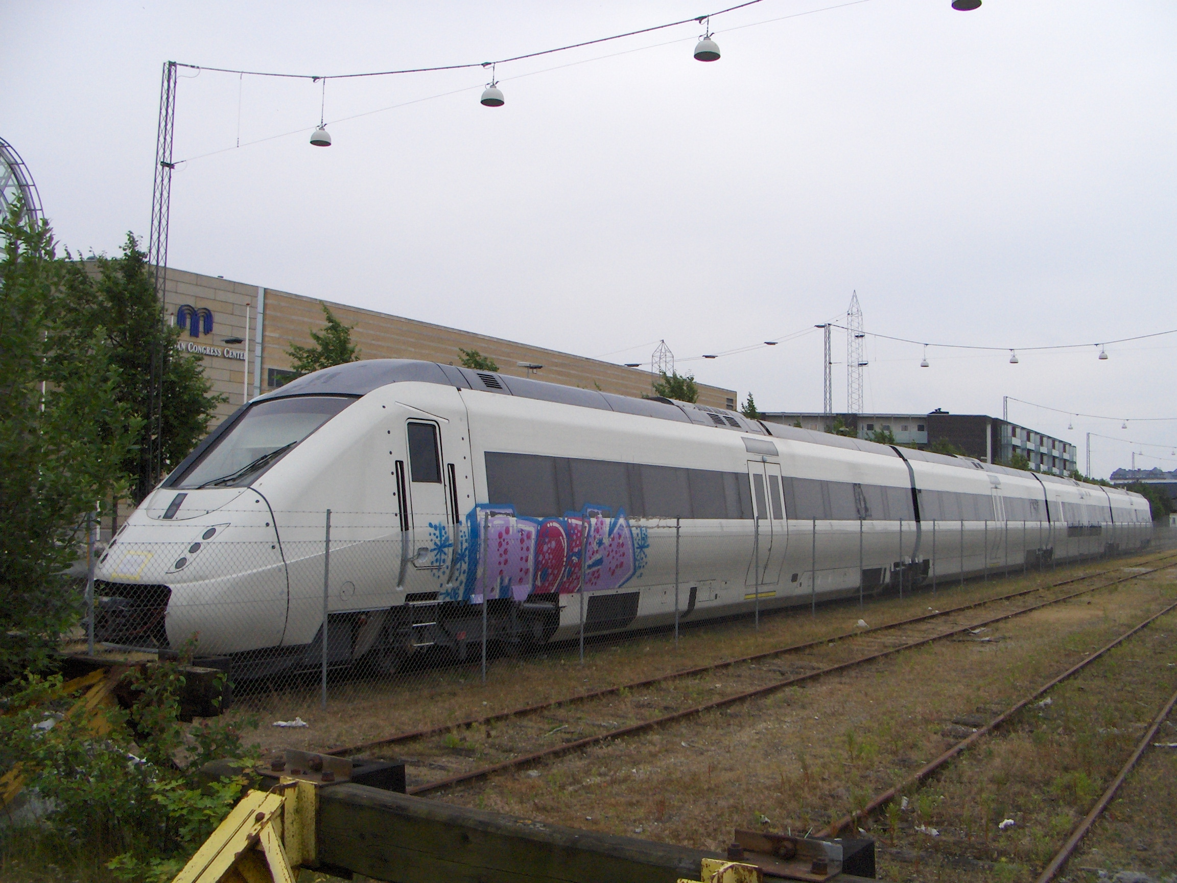 DSB IC4 test train in Århus, Denmark.